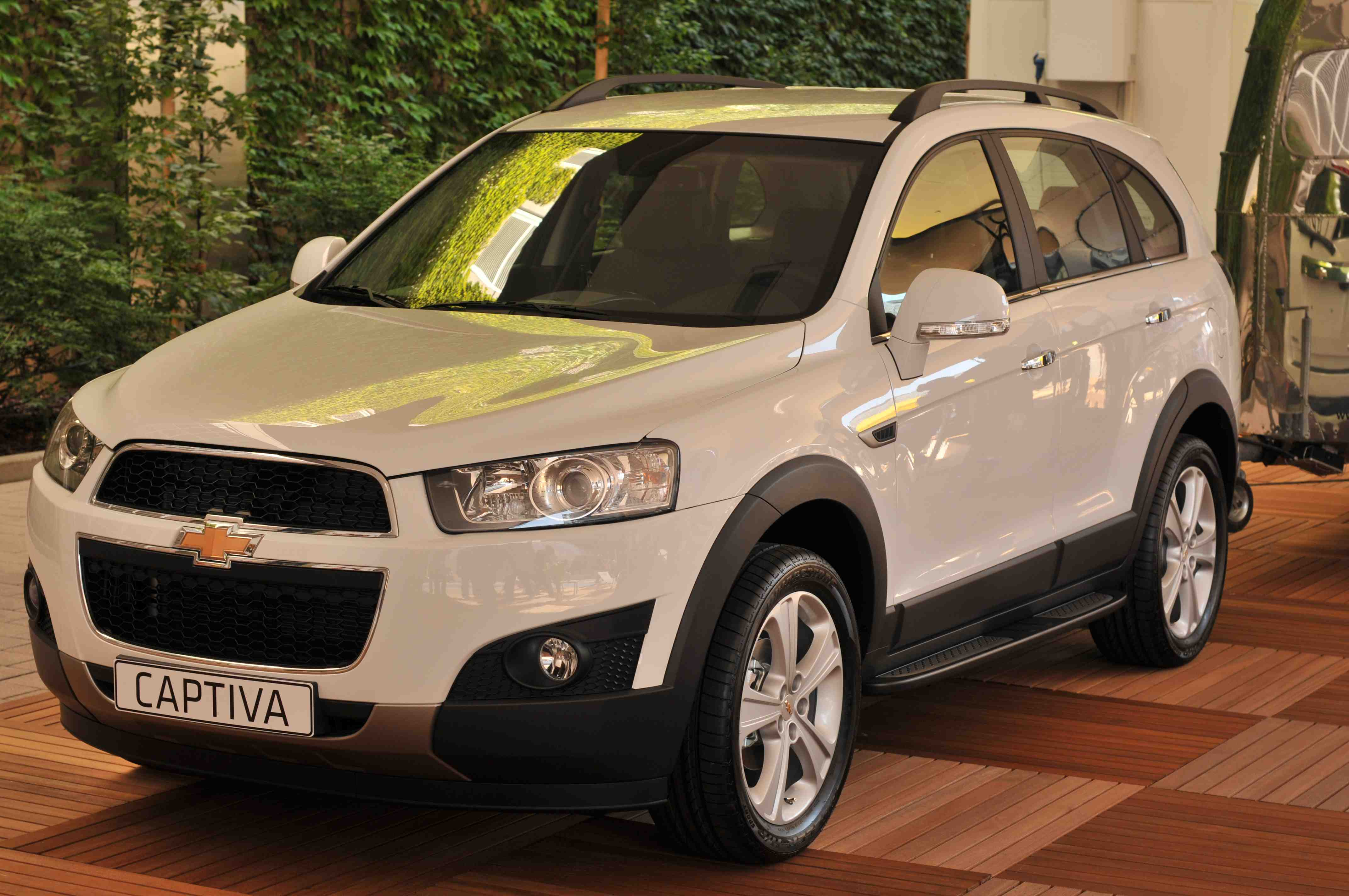 IAA 2011 - Internationale Automobilausstellung in Frankfurt/Main